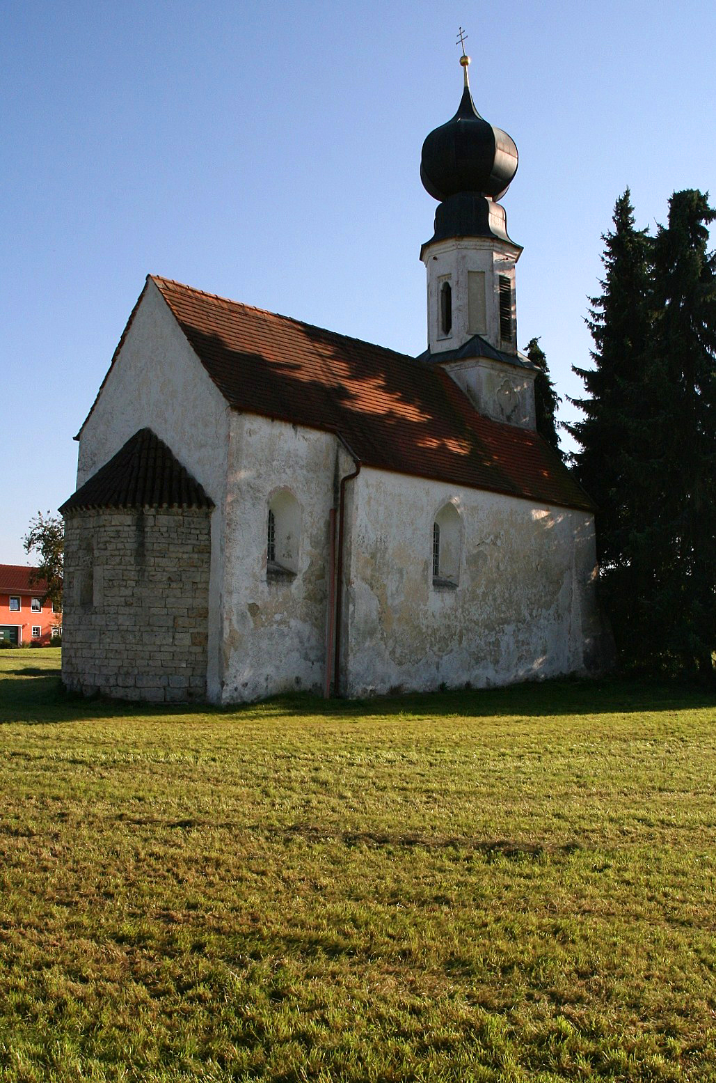 Die Rückseite der Filialkirche St. Aegidius in Kolbing, einem Ortsteil von Kraiburg am Inn (Landkreis Mühldorf am Inn, Oberbayern). Die vormals mittelalterliche Kirche wurde 1759 gründlich barockisiert. Auf der Rückseite blieb jedoch eine romanische Chorapsis des ursprüngliches Baus (12./13. Jahrhundert) - entsprechend wertvoll dieser Bauteil am insgesamt gefälligen kleinen Gotteshaus.